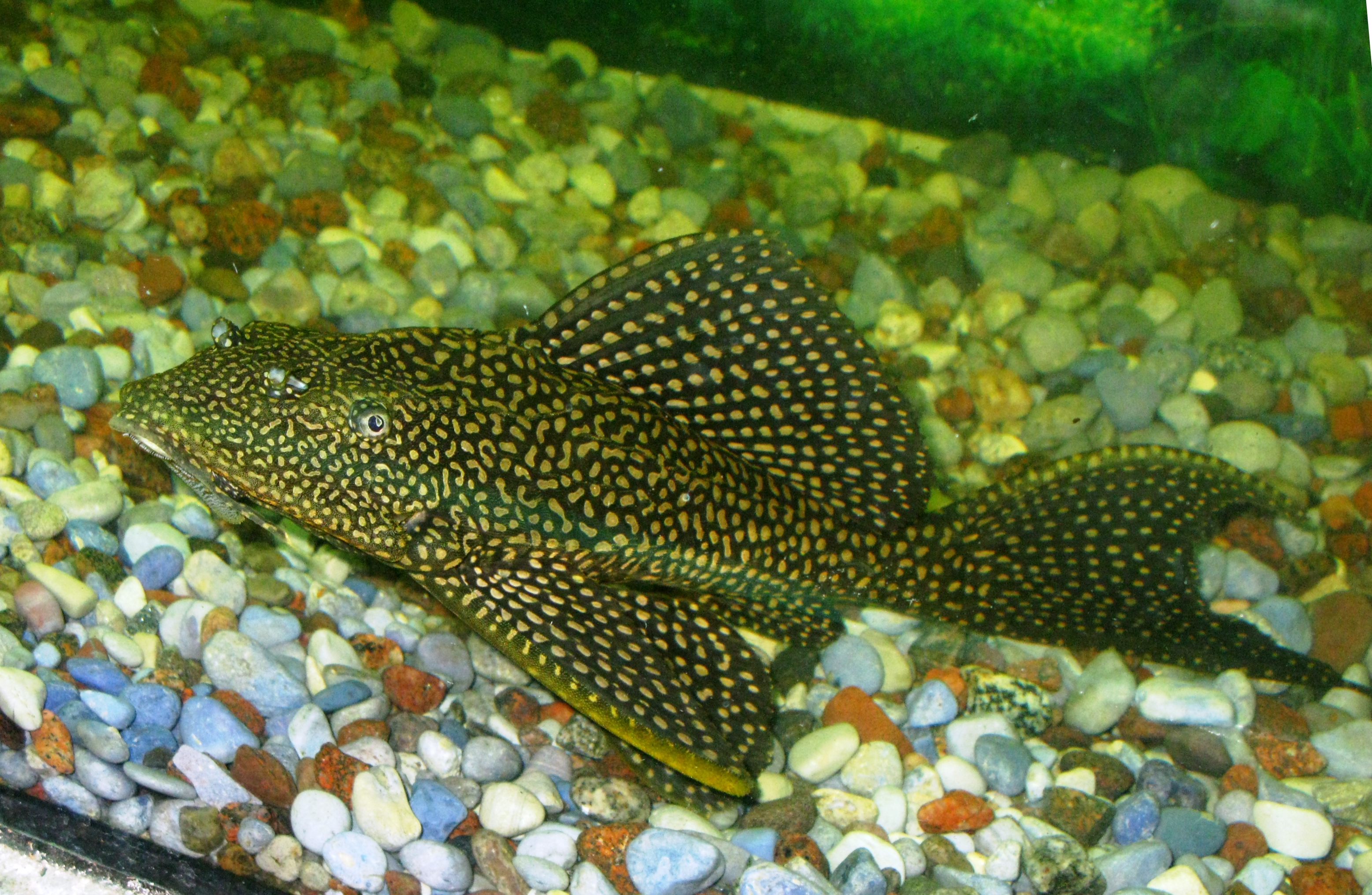 Pterygoplichthys sp. в зоопарке города Гродно, Беларусь.